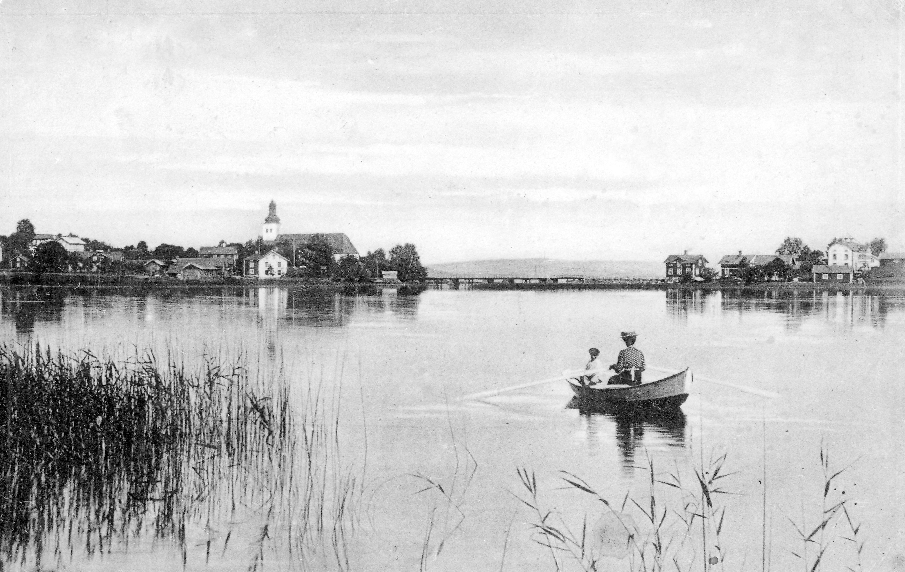 Sjön Södra Barken och Söderbärke